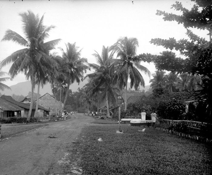 Negatief. De hoofdweg door Solok met aan weerszijde van de straat huizen en palmbomen.. Hoofdweg te Solok, met woning en bureau van een ingenieur van de spoorwegen